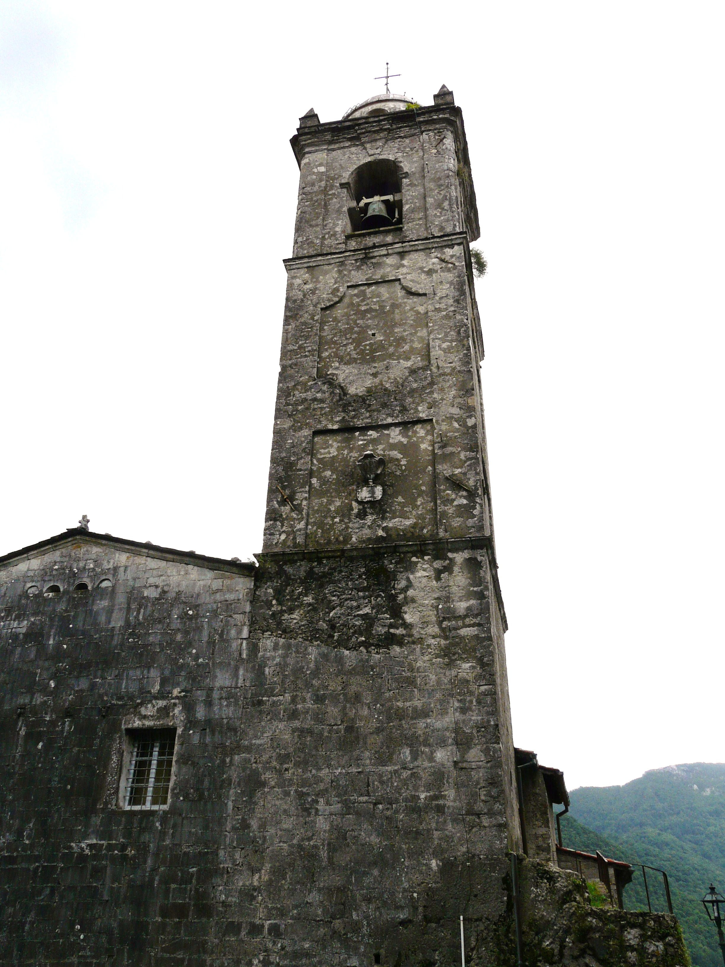 Campanile della Chiesa di Santa Maria Assunta, Stazzema, Toscana, Italia